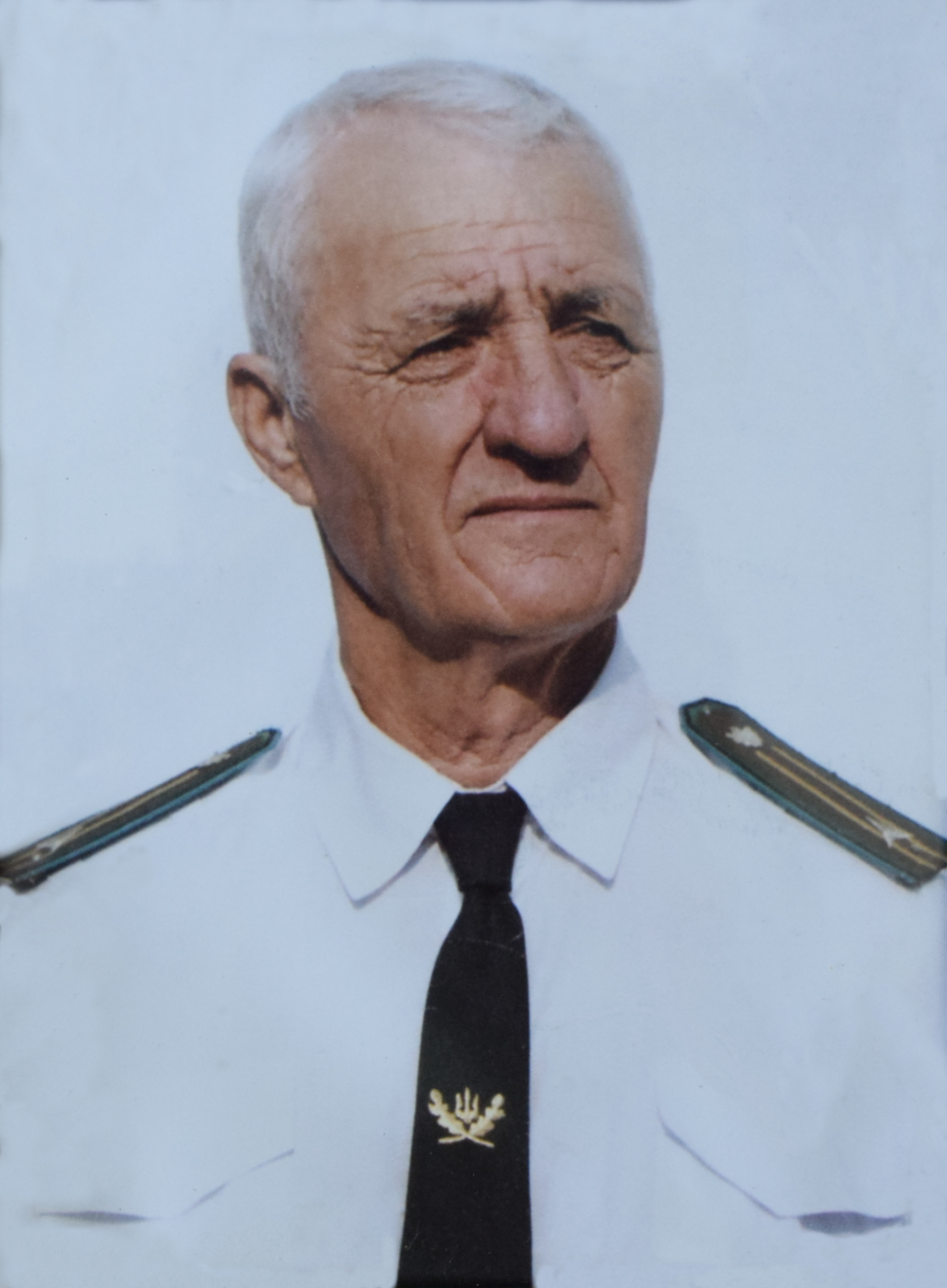 «Лиманський», Білгород-Дністровський р-н, Семенівська сільська рада, Старокозацьке лісництво, кв. 7-8